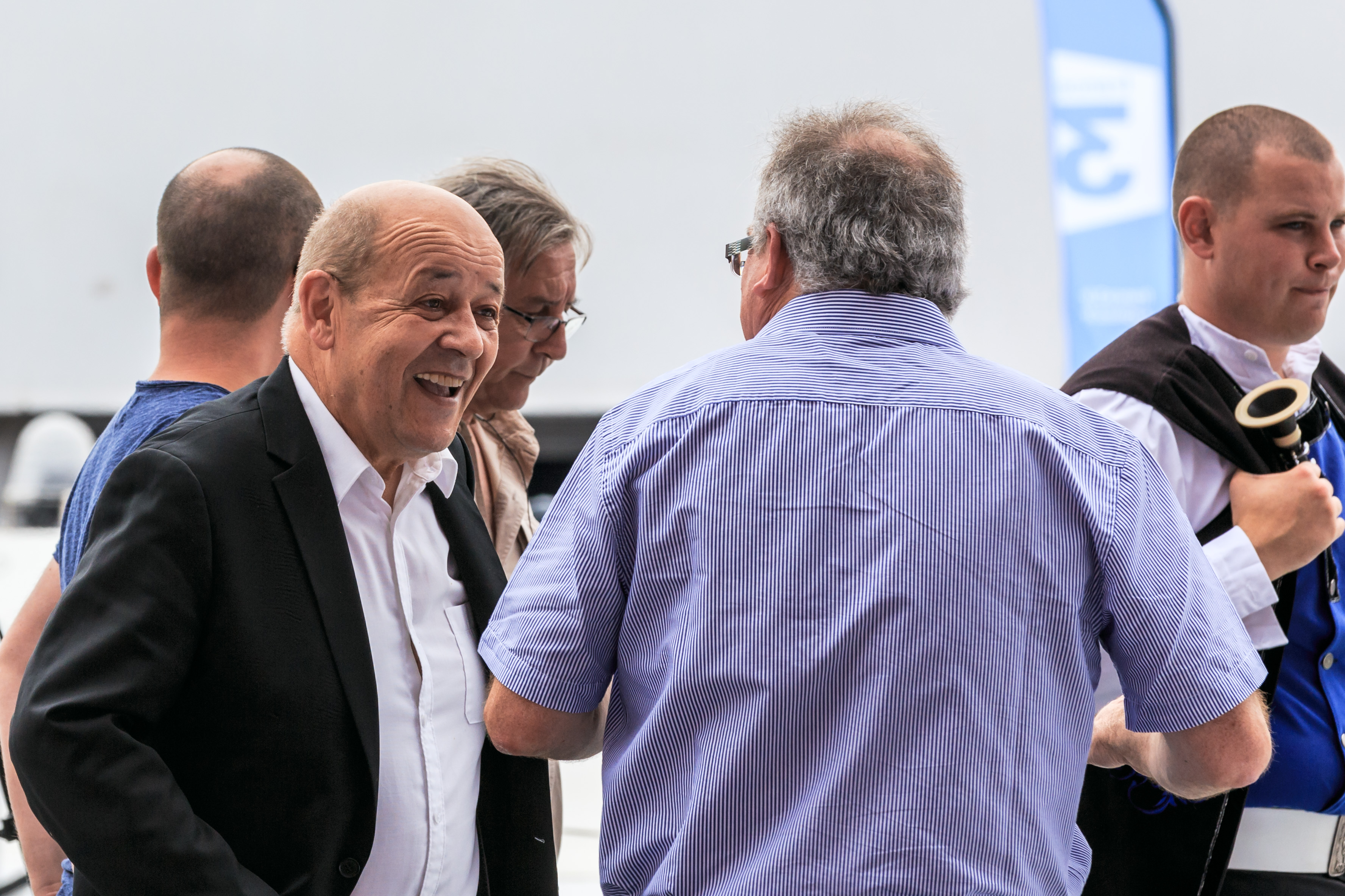 Épreuve d'été du Championnat national des bagadoù de Première catégorie organisée au stade du Moustoir dans le cadre du Festival Interceltique de Lorient en Bretagne.